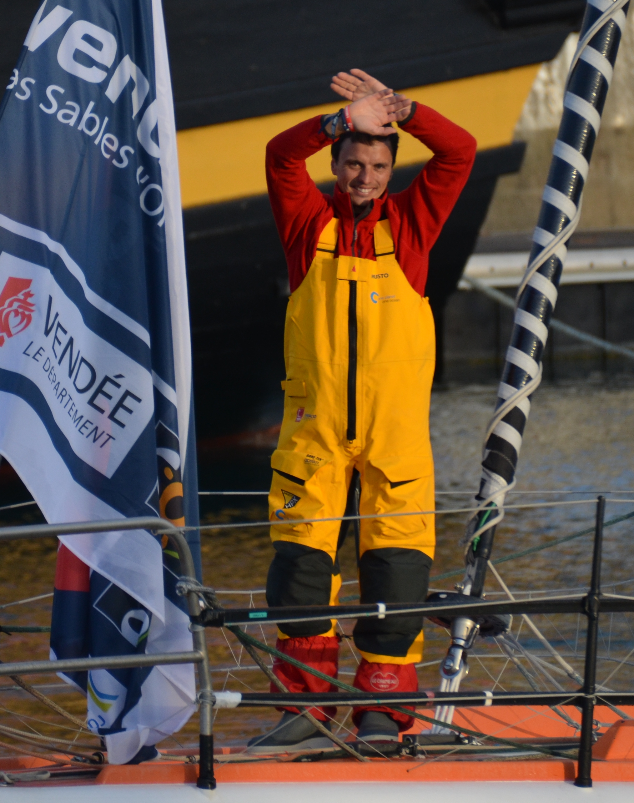 Didac Costa lors du départ du Vendée Globe 2016-2017